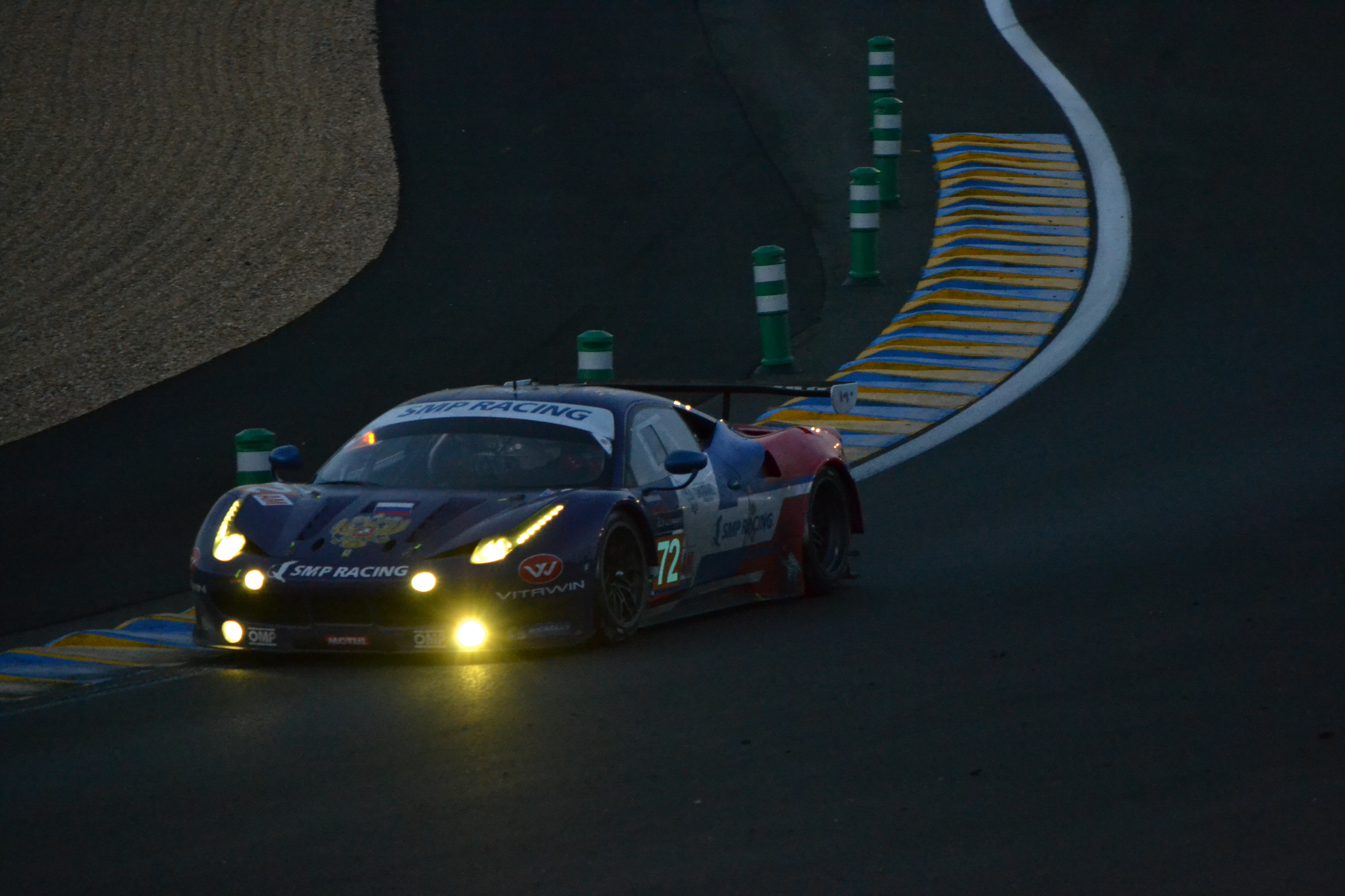 La Ferrari 458 Italia GT2 de SMP Racing, dans les esses de la forêt, lors des 24 Heures du Mans 2014.